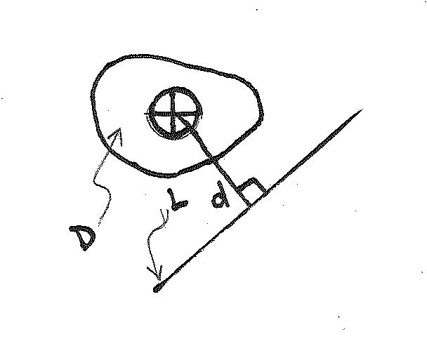 Ett område D ligger helt på en sida om linjen L. Områdets tyngdpunkt är markerad.